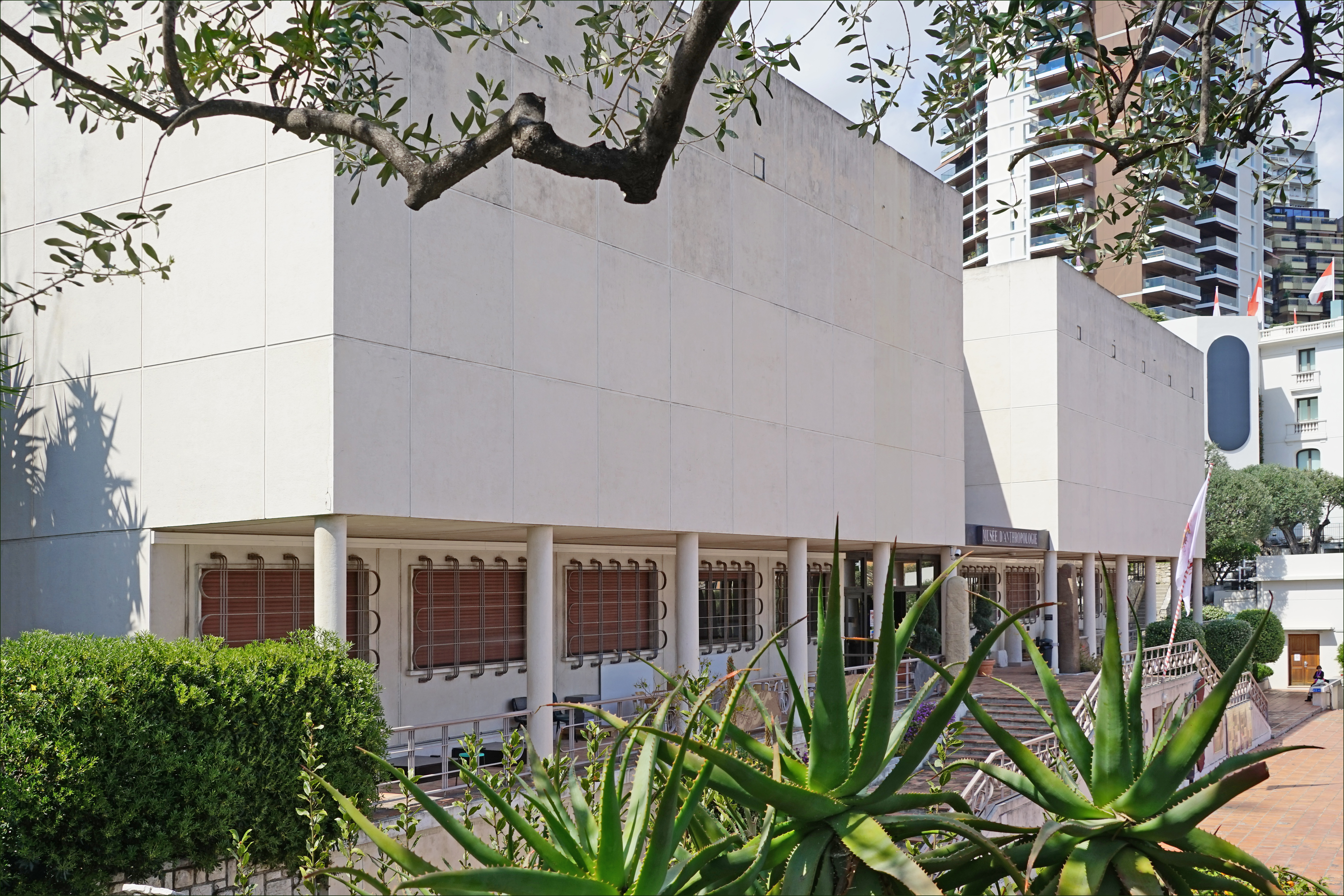 Fondé en 1902 par le Prince Albert Ier, le musée d'anthropologie préhistorique a été installé dans l'enceinte du jardin exotique en 1955. Il conserve des objets archéologiques et des fossiles issus de fouilles menées dans des sites préhistoriques de Monaco et de la région. Les travaux scientifiques menés par le laboratoire du musée à Monaco et dans le monde (notamment en partenariat avec la Mongolie) y sont présentés au public. Construit à flanc de falaise le Jardin Exotique offre une vue panoramique sur la Principauté de Monaco et propose de découvrir des plantes succulentes aux formes étranges dont les cactées (ou cactus) constituent la famille la plus représentative. Les végétaux acclimatés dans ce Jardin sont originaires de plusieurs zones sèches lointaines (d'où le terme "exotique") : sud-ouest des Etats-Unis, Mexique, Amérique centrale et du sud pour les cactées et les agaves ; Afrique du sud, orientale et péninsule arabique pour les autres succulentes. Extrait du site du jardin exotique de Monaco